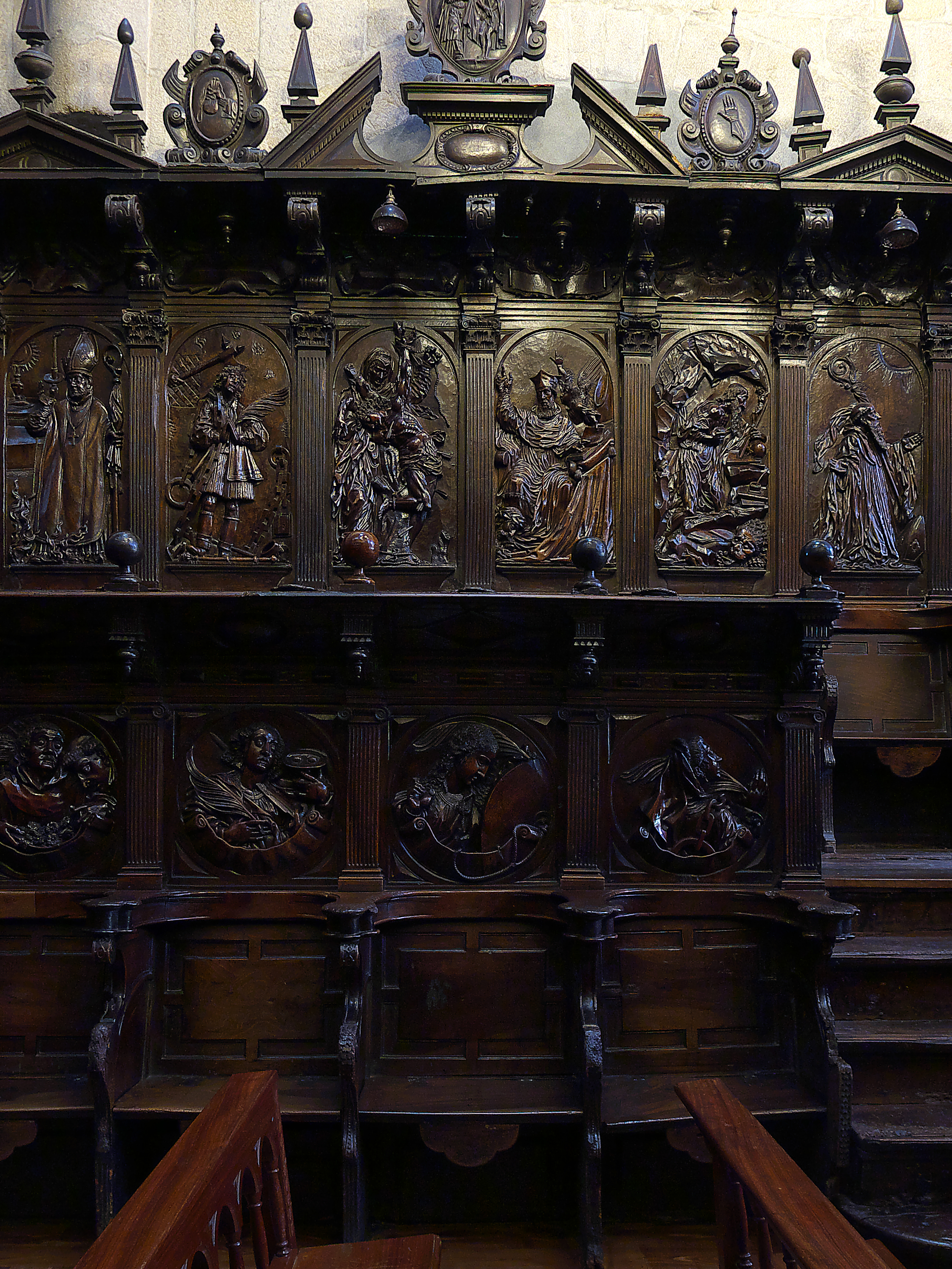 Sillería de coro. Francisco de Moure (1624)